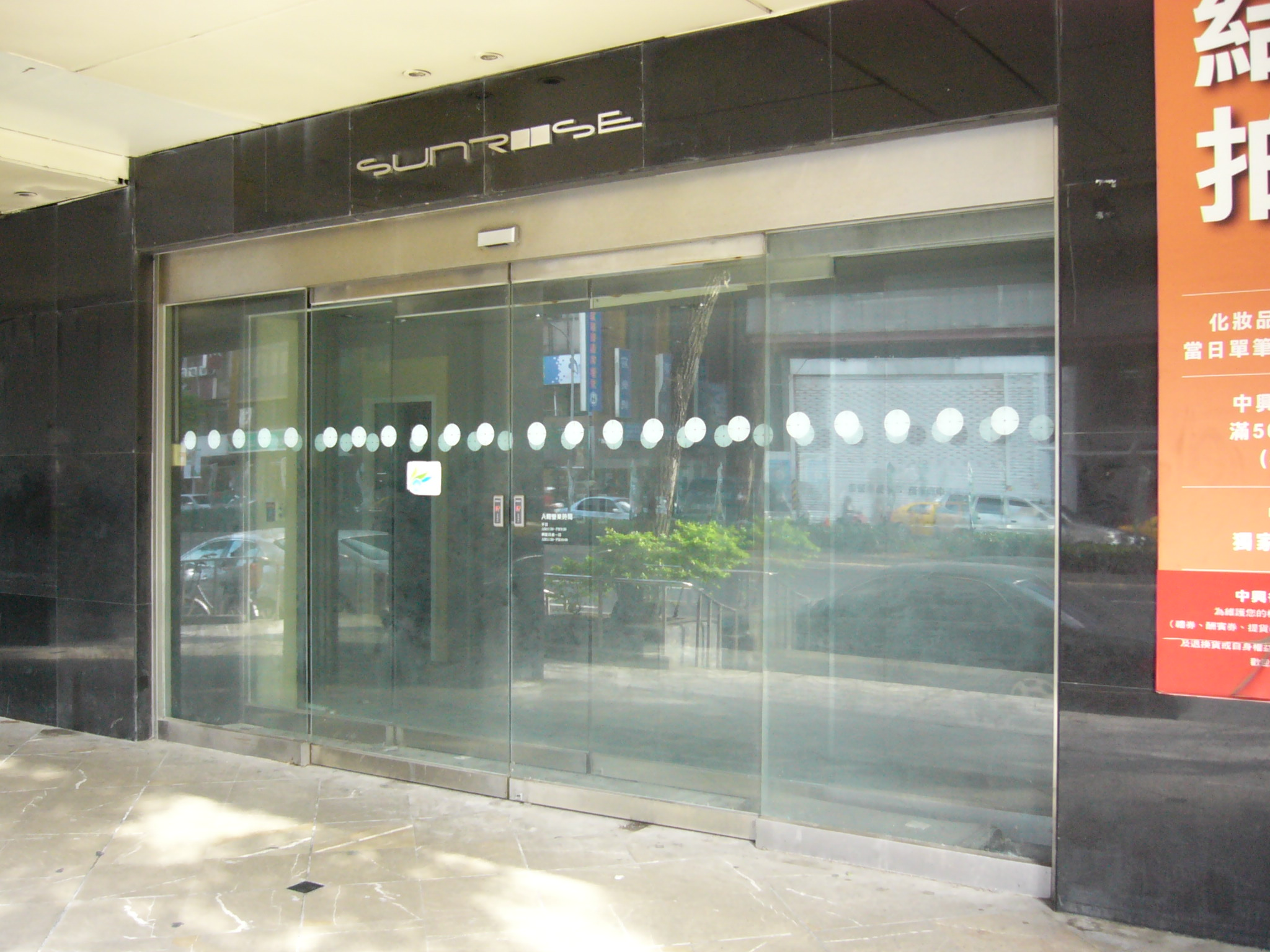 芝蔴大廈復興北路側1樓，中興百貨復興店A館結束營業後大門今貌。